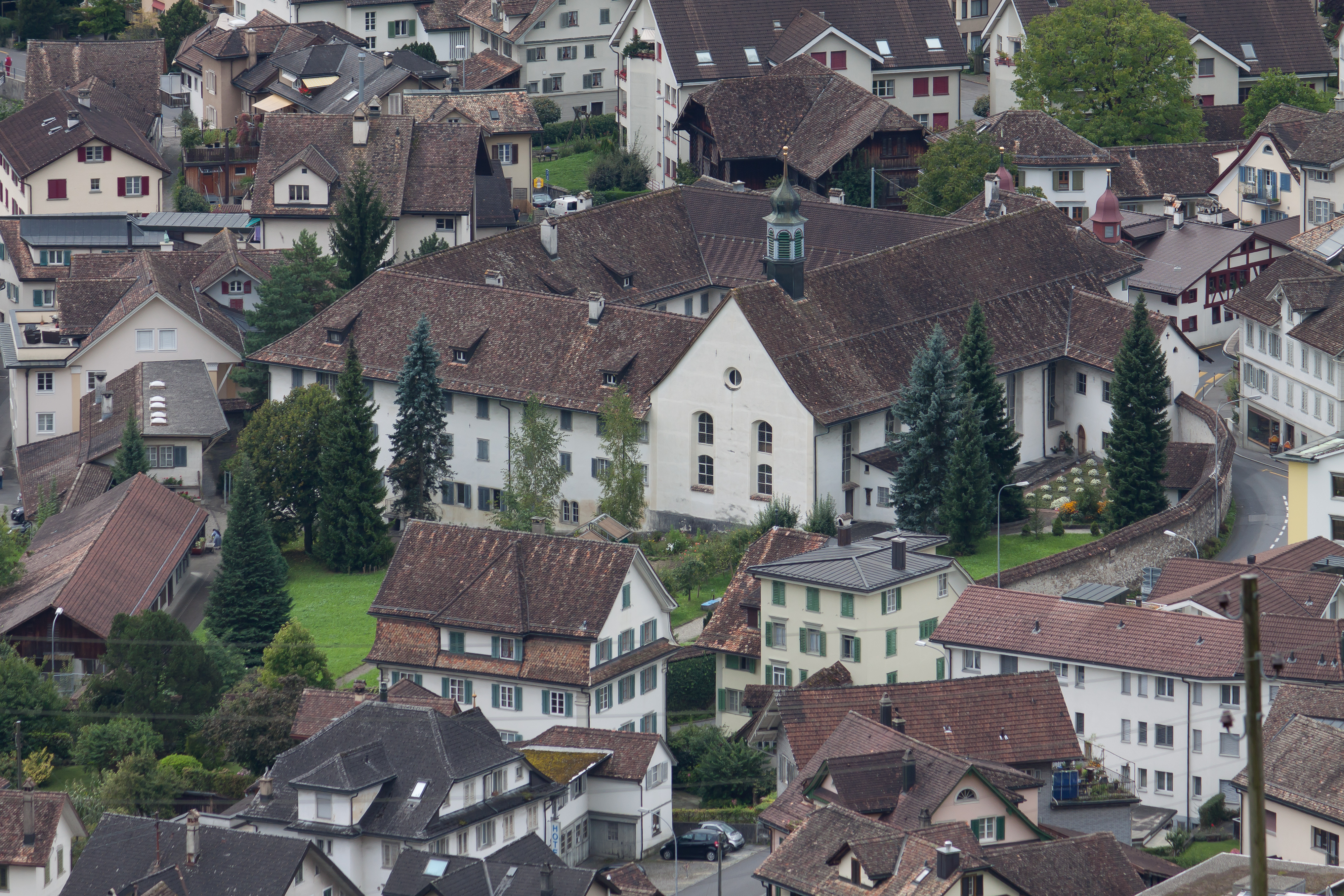 Dominikanerinnenkloster St. Peter am Bach, Strehlgasse 18, Schwyz